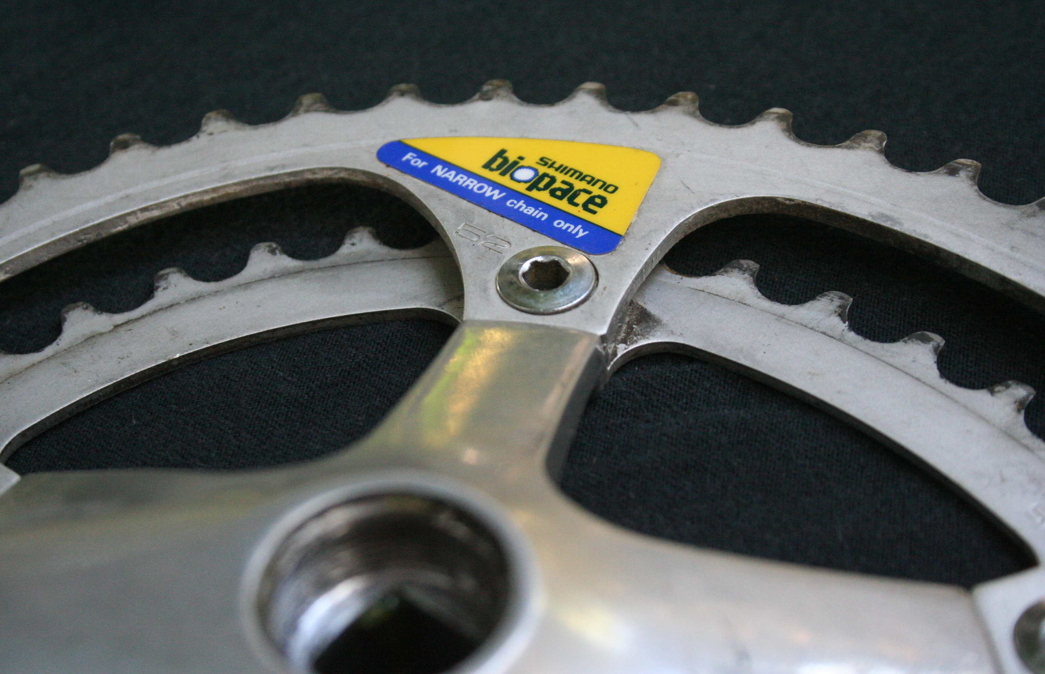 Shimano Exage 500 Rennradkurbel mit Biopace Label